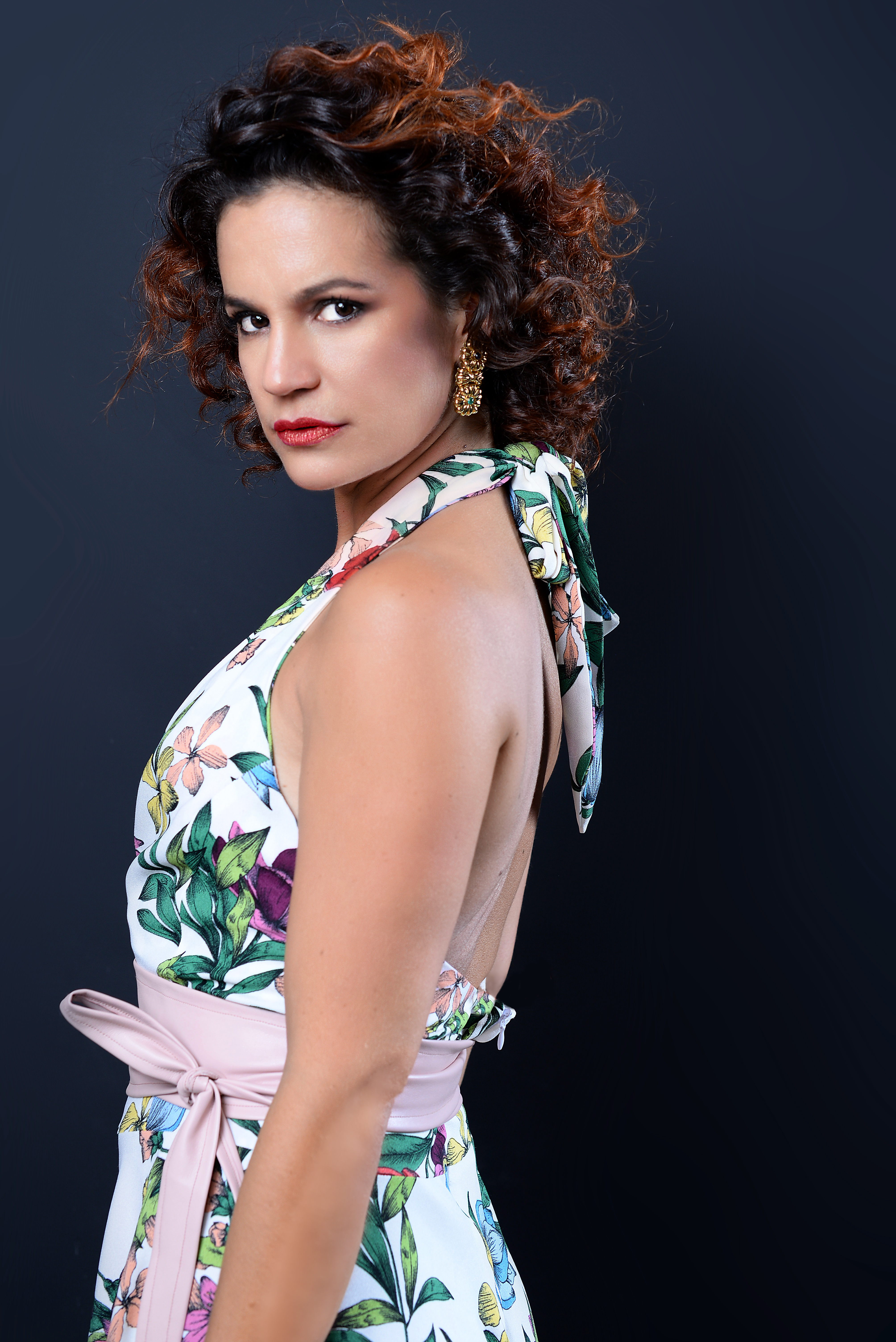 Marieta Orozco